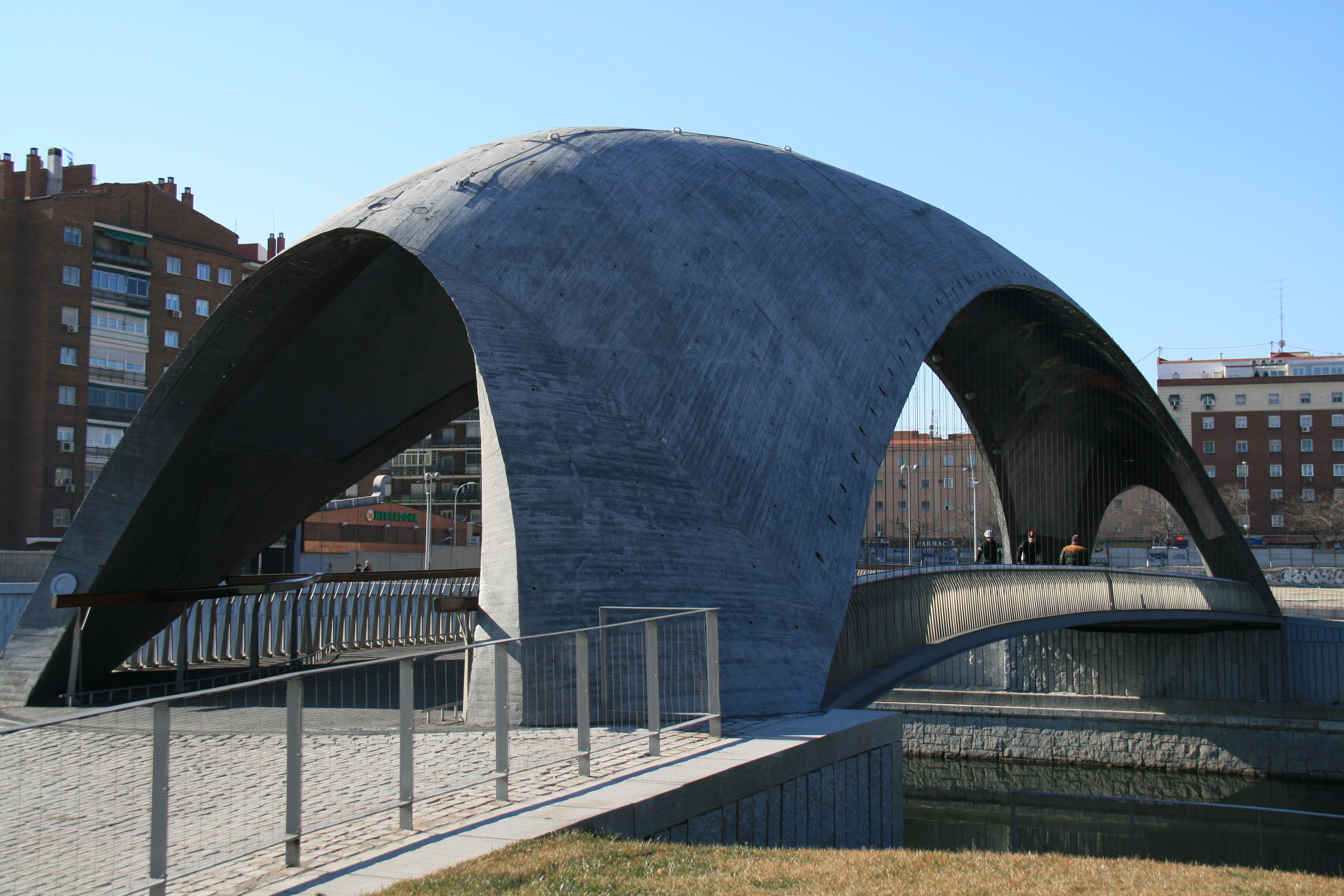 Puente-Arganzuela-Madrid Río.JPG